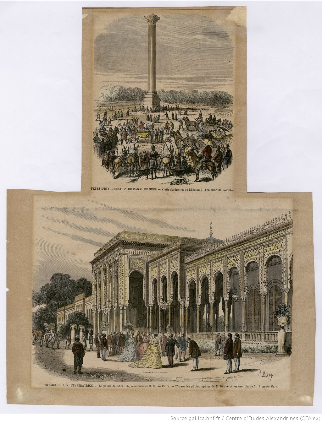 Fêtes d'inauguration du canal de Suez - Visite des invités du khédive à la colonne Pompée Voyage de S. M. l'Impératrice - Le palais de Ghezireh, résidence de S. M. au Caire